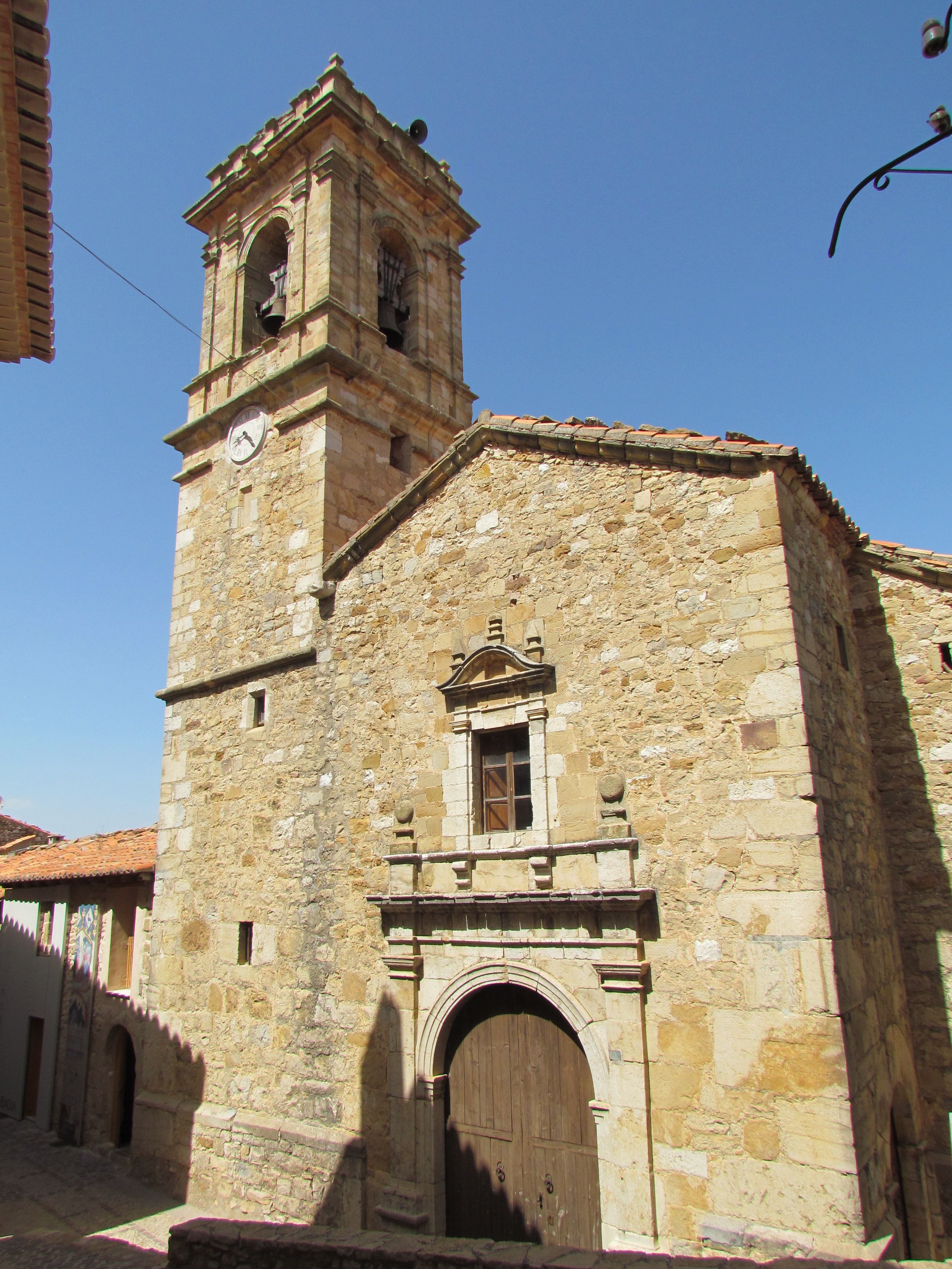 Façana principal de l'església del Salvador de Culla, Alt Maestrat (País Valèncià)